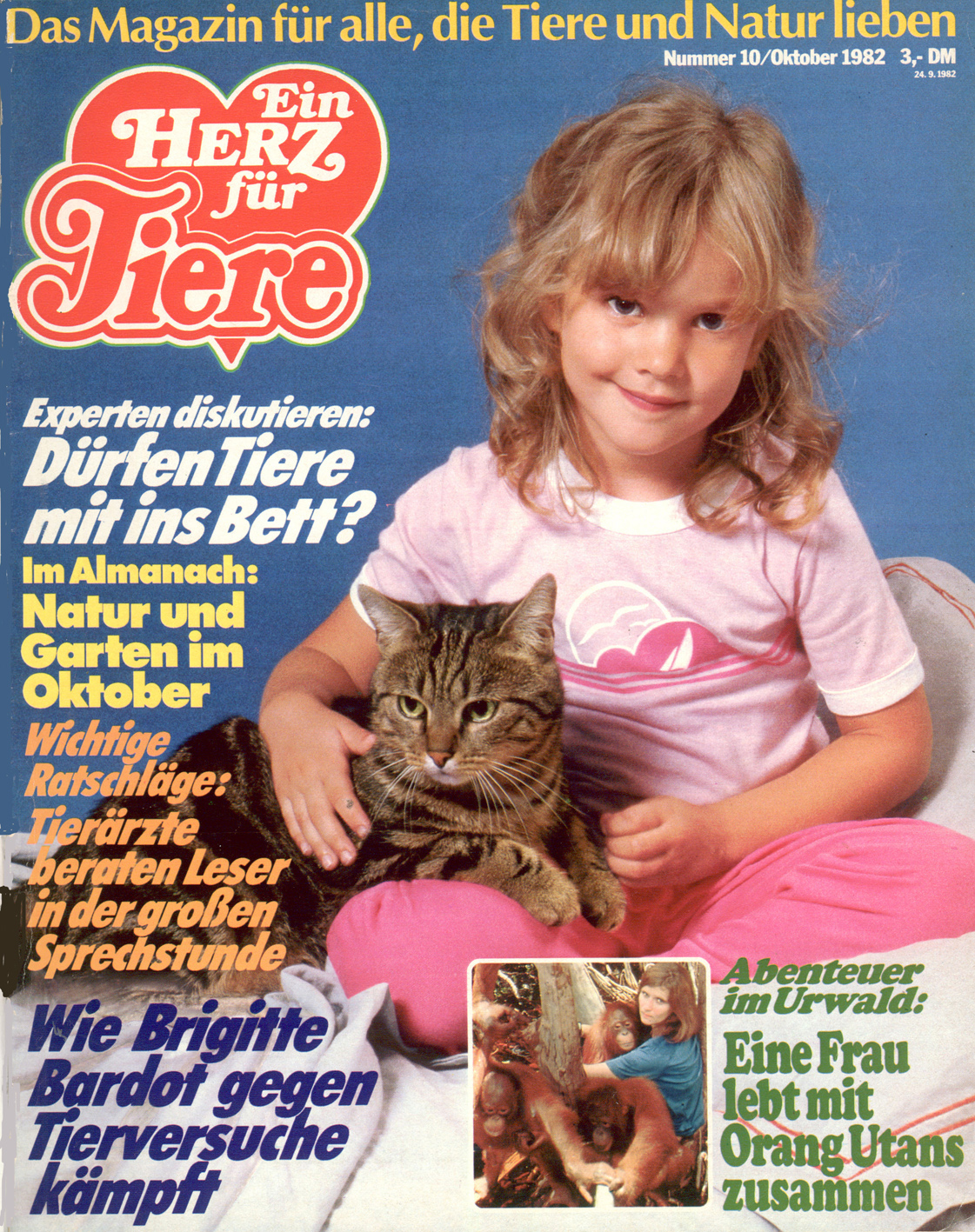 Erstes Magazincover von Ein Herz für Tiere